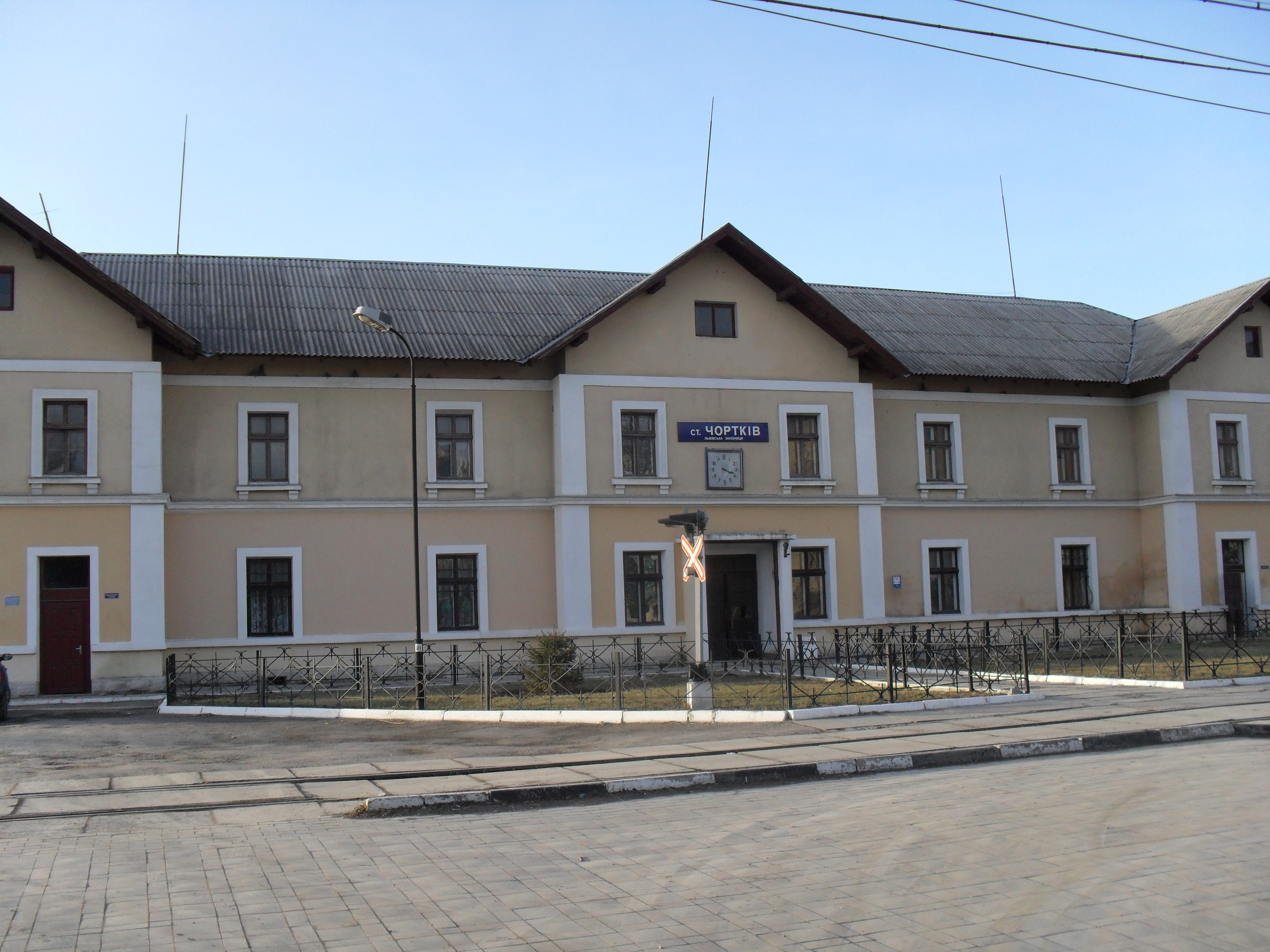 м. Чортків. Залізнична станція